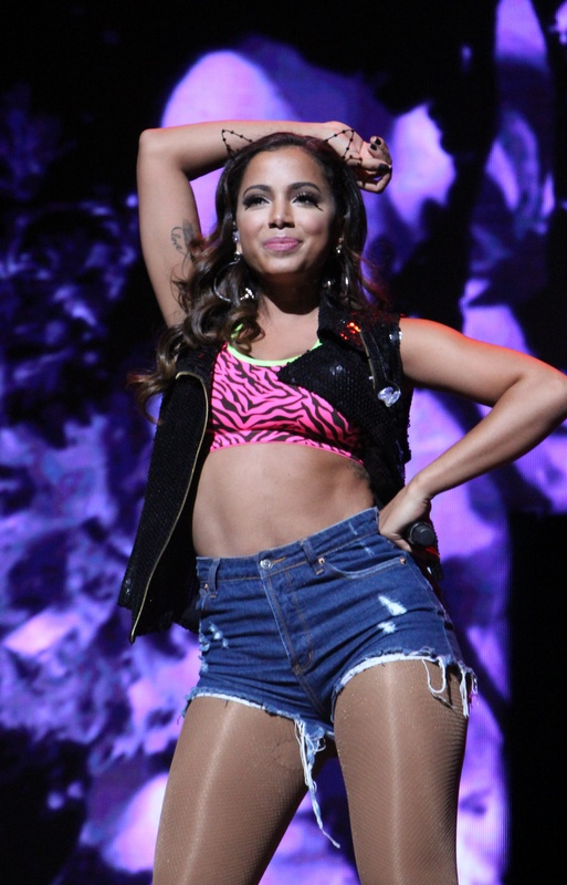 45 - Anitta (45)